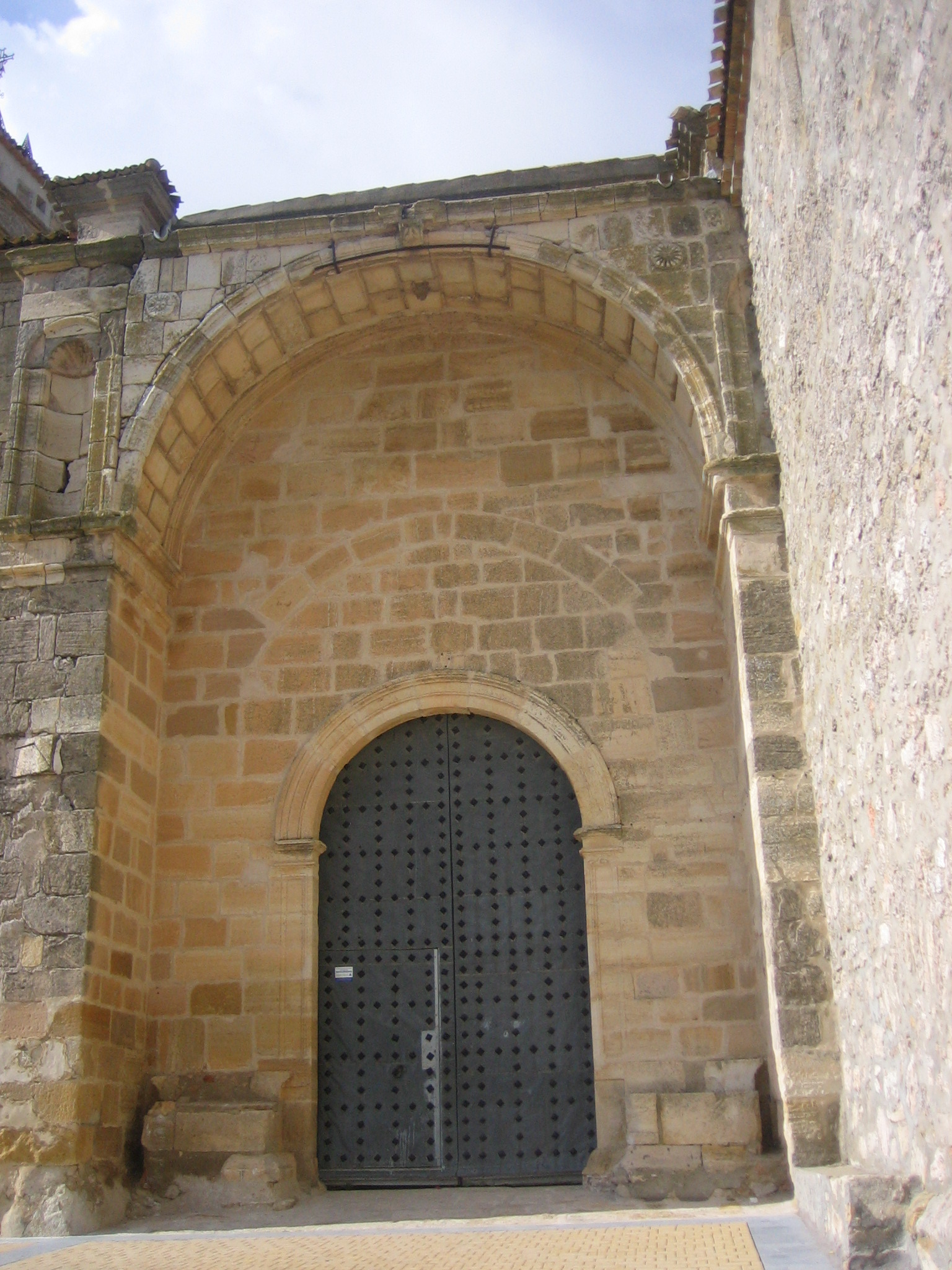 Puerta sur de la iglesia de Santo Domingo, Alcazar del Rey (Cuenca, España)